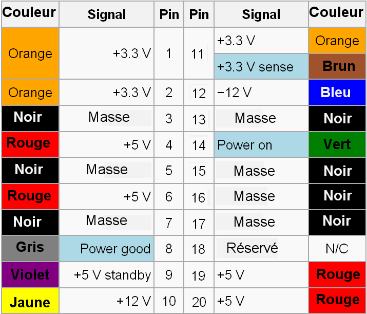 Schéma de fonctionnalité des broches d'alimentation ATX 20 pins d'ordinateur. Un schéma équivalent pour les broches d'alimentation ATX 24 pins existe aussi au nom de PowerSupplyUnit_24Pins.png